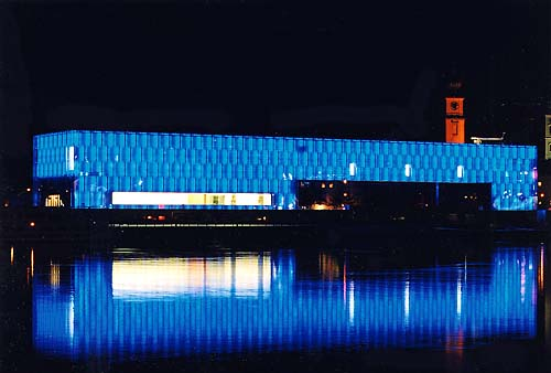 Lentos Kunstmuseum Linz at night. Quelle/Source: KOMM, Stadt Linz, Austria